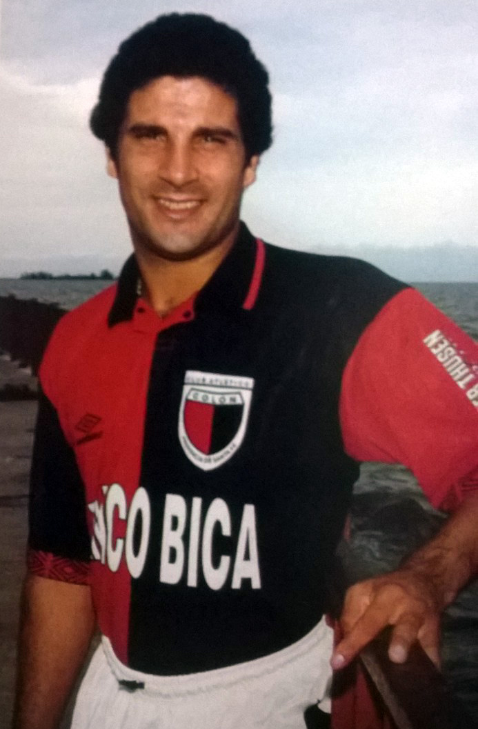 Marcelo Saralegui, formó parte del equipo subcampeón de 1997 y marcó el gol contra Independiente que le permitió a Colón jugar por primera vez la Copa Libertadores.